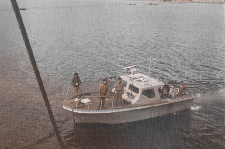 ספינת יתוש במבט מראש המנוף